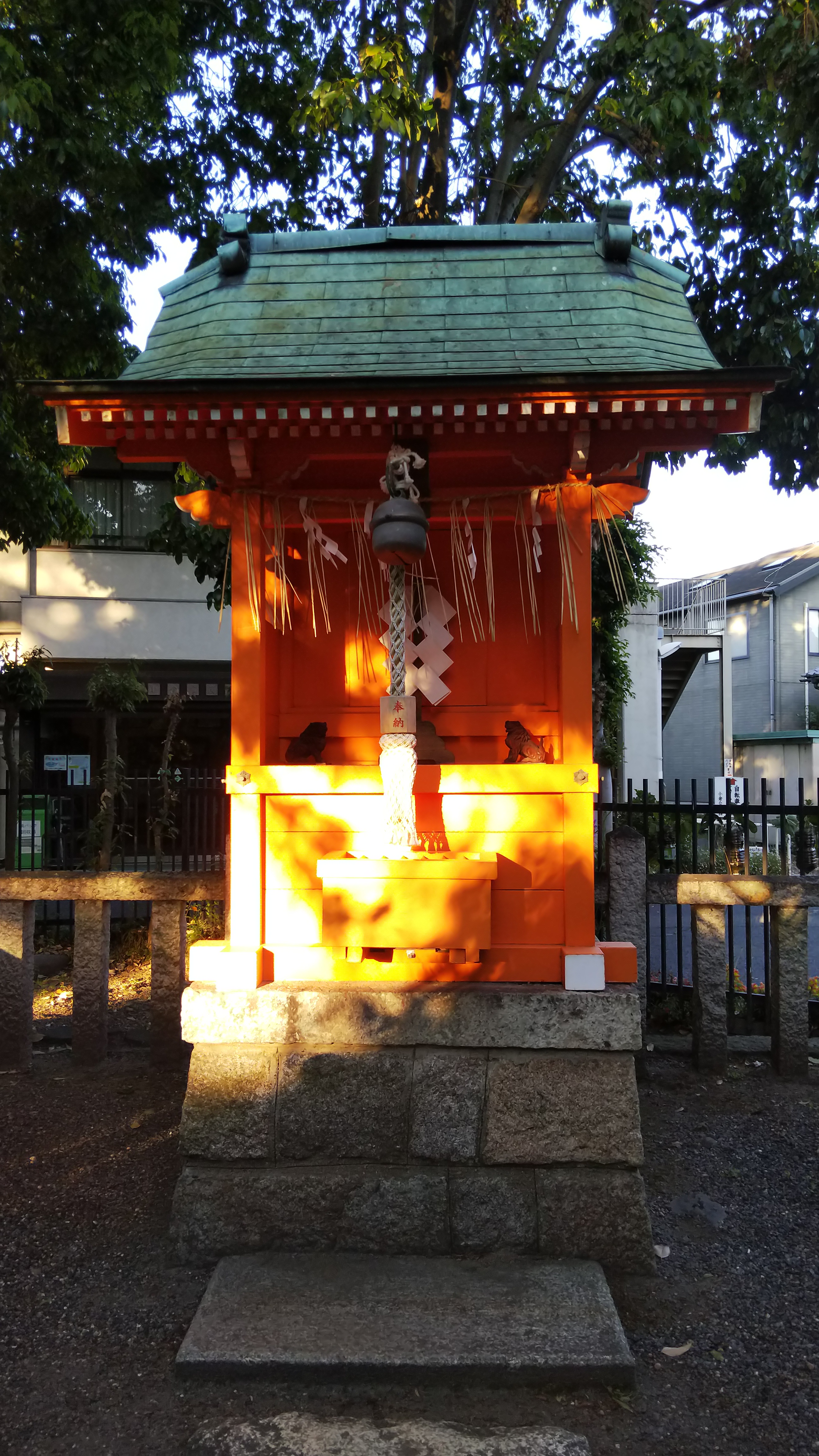 子守神社（巨椋神社境内社）